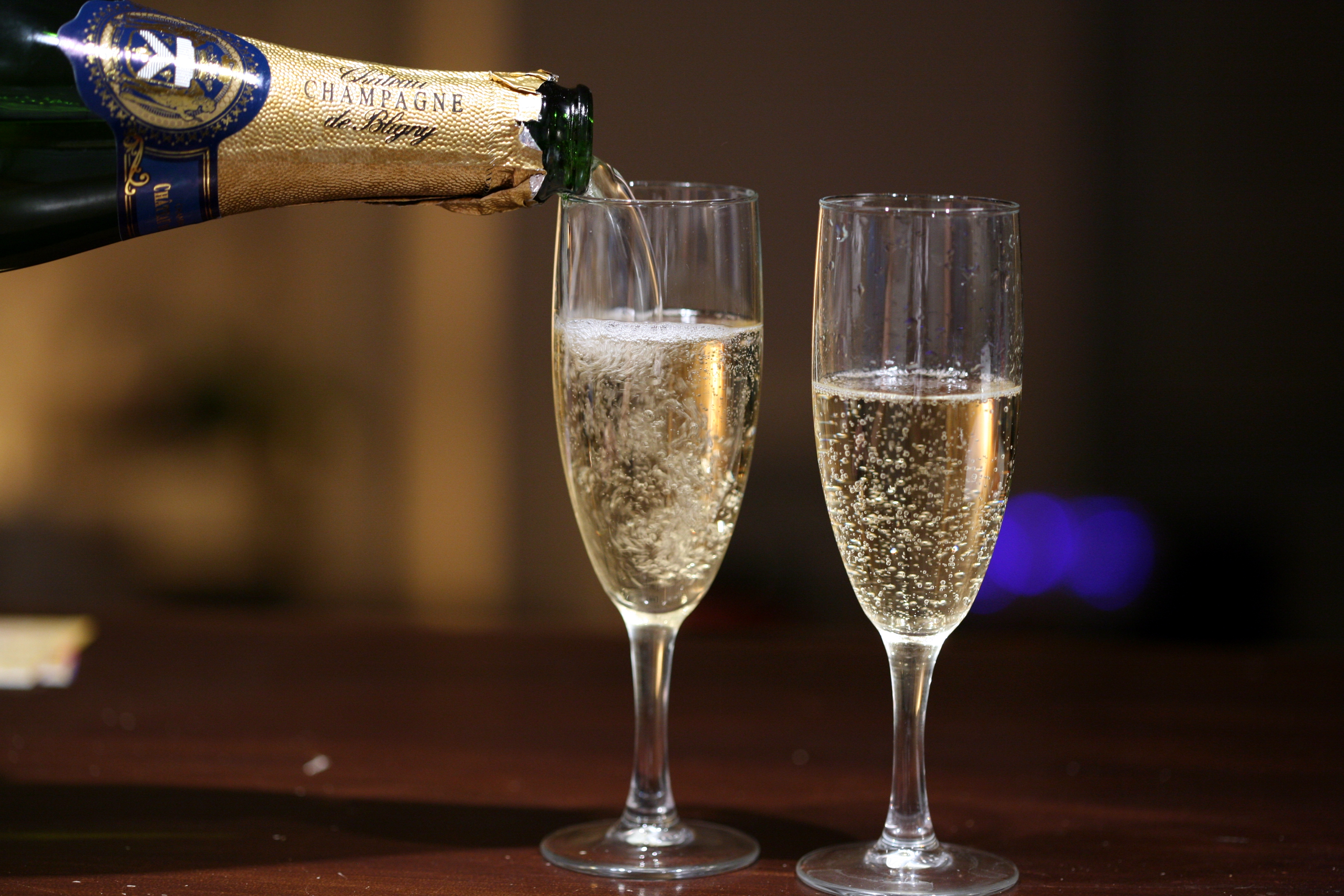 La Grande Réserve